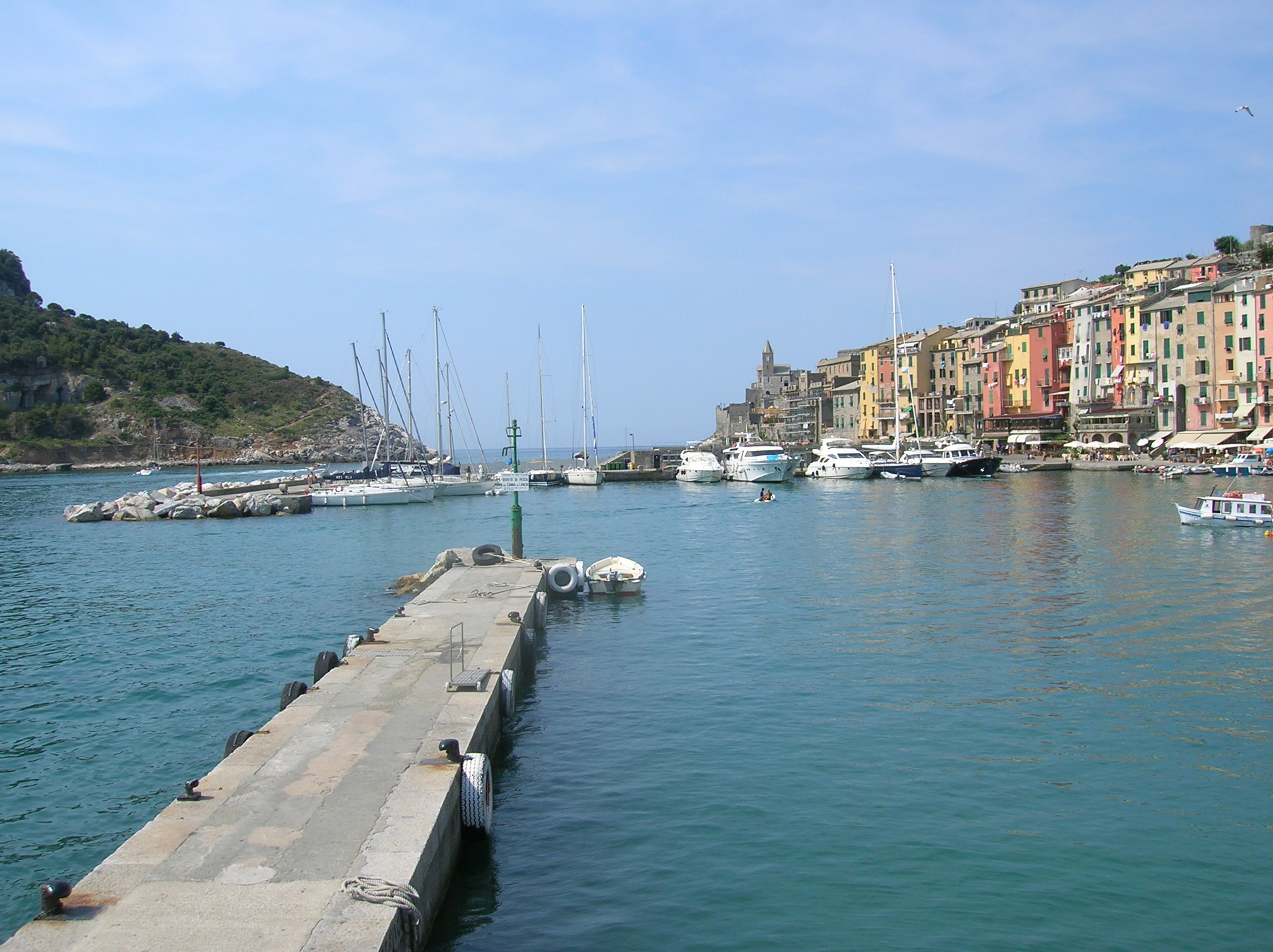 Portovenere, Liguria, Italia